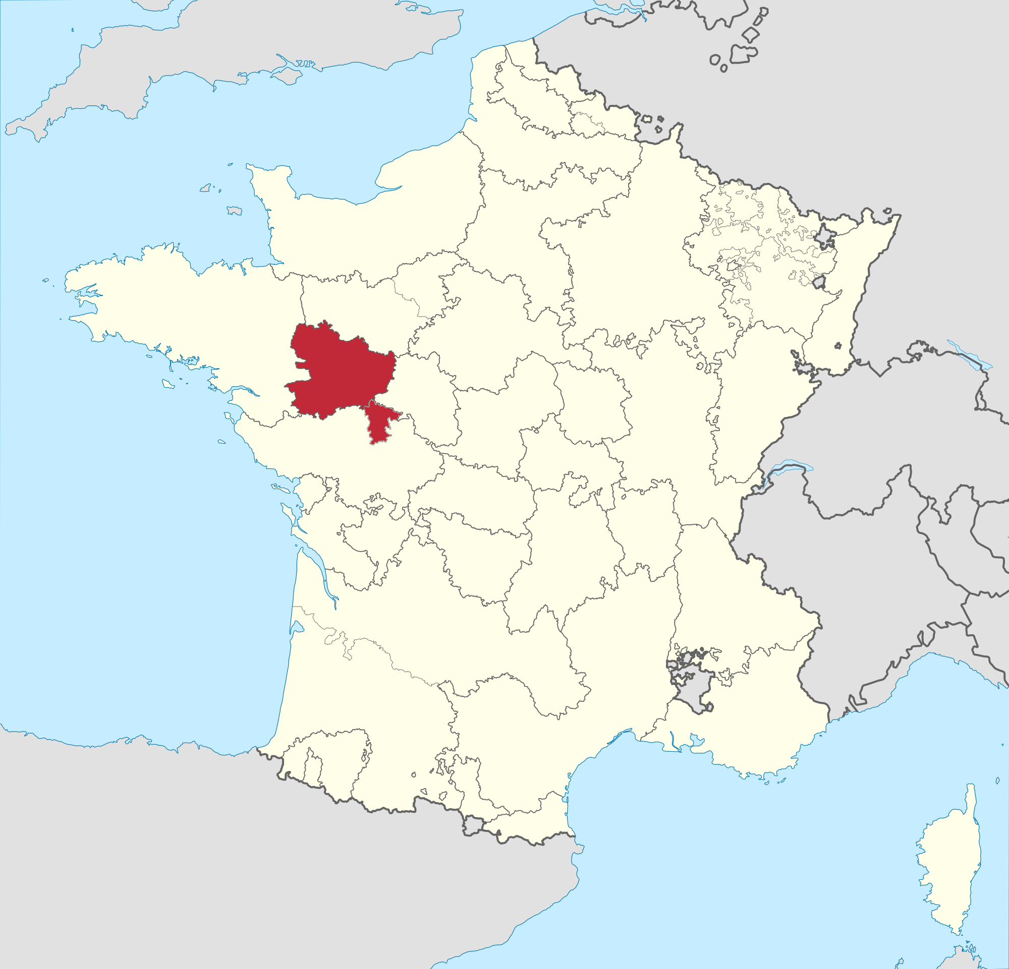 Province de l'Anjou en 1789